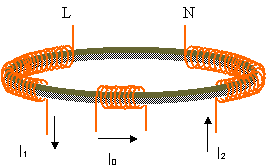 Принцип на действие.